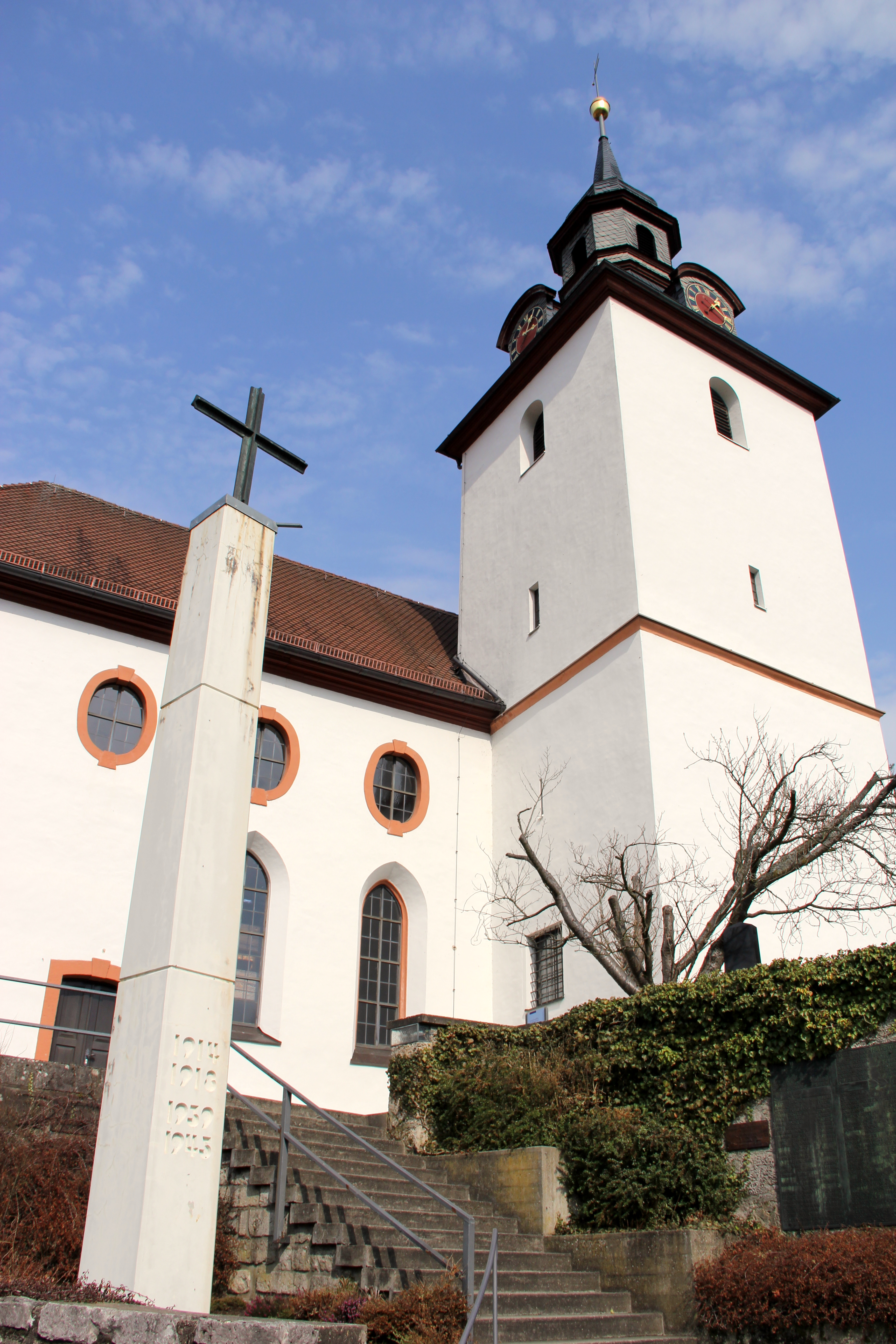 St. Laurentiuskirche im März 2012